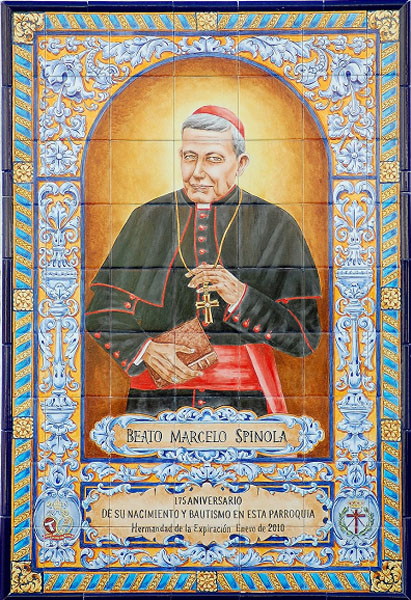 Retablo cerámico del Beato Marcelo Spínola (1835-1906), que fue cardenal y arzobispo de Sevilla.